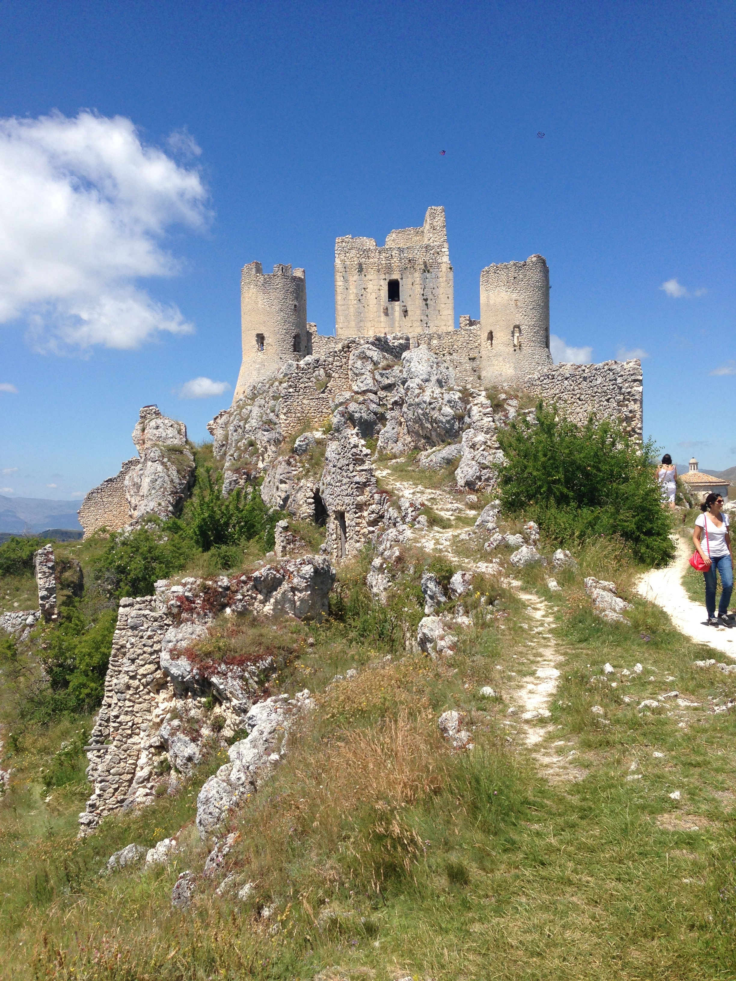 Vista frontale della rocca di calascio in provincia dell'Aquila